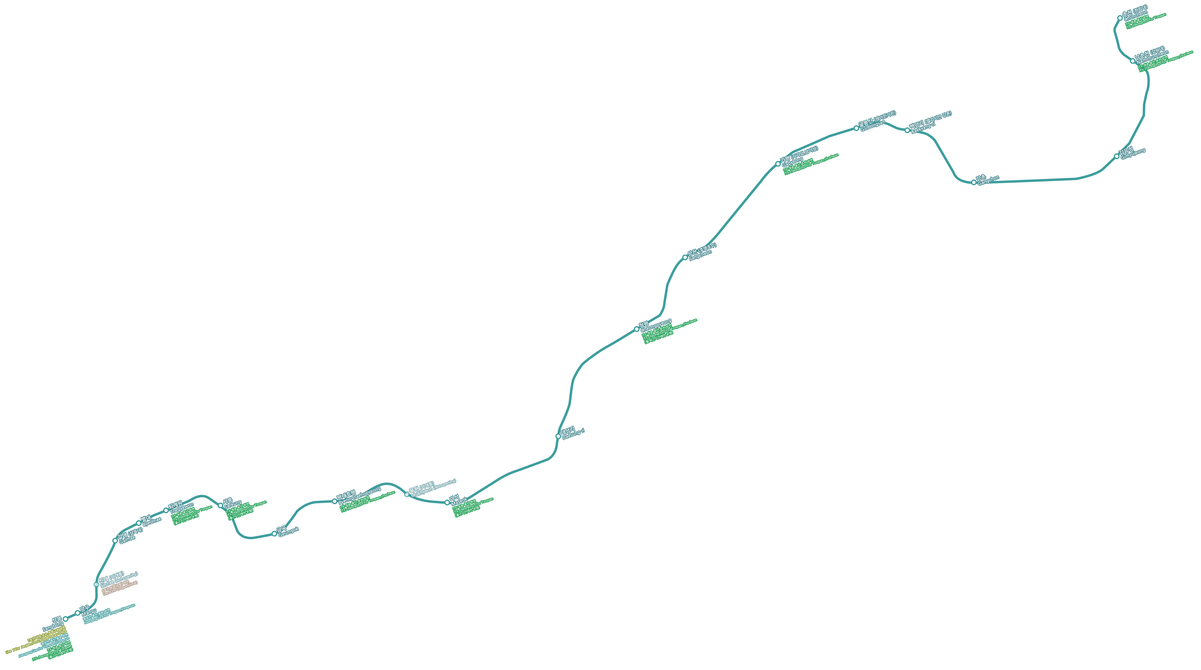 1.본 노선도를 배포하실 경우에는 되도록 저작자를 기재해 주시기 바랍니다. 2.본 노선도에 나온 미개통/계획 표시등은 새로 정보가 나오는대로 업데이트를 실시 할 것입니다. 3.본 노선도의 저작권은 안양역(ksrt6848)에게 있으며, 자유적으로 배포하실 수있는 사진입니다.